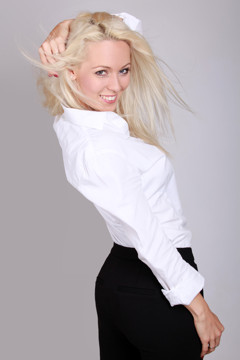 Markéta Martiníková 2016